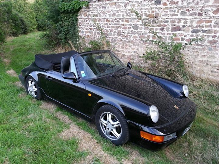 Porsche 911 Carrera 2 cabriolet (modèle 964) de 1991.